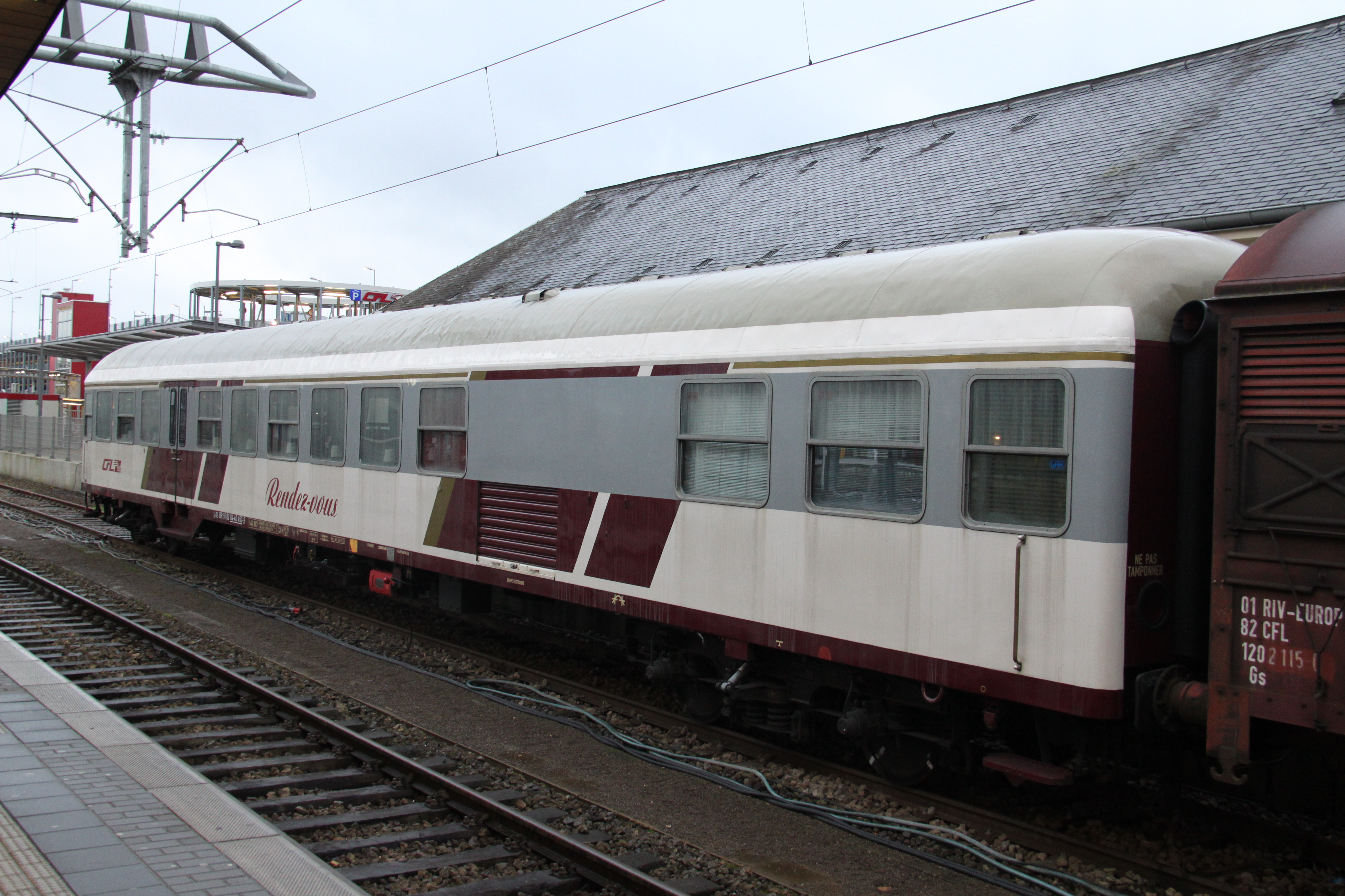 Een tot restauratiewagon verbouwde Nahverkehrswagen van de CFL